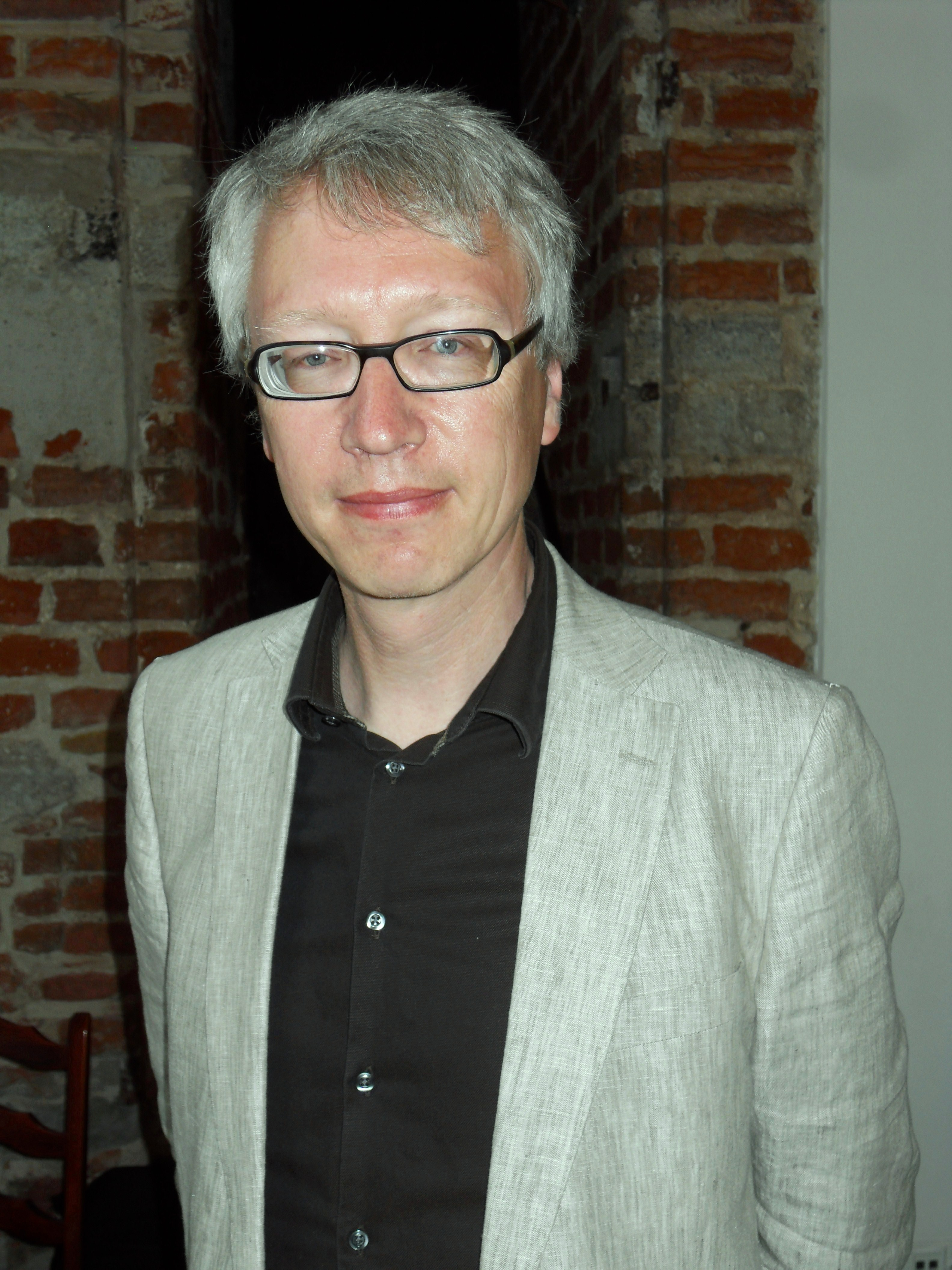 Dr Peter Oliver Loew, niemiecki historyk związany z Gdańskiem.